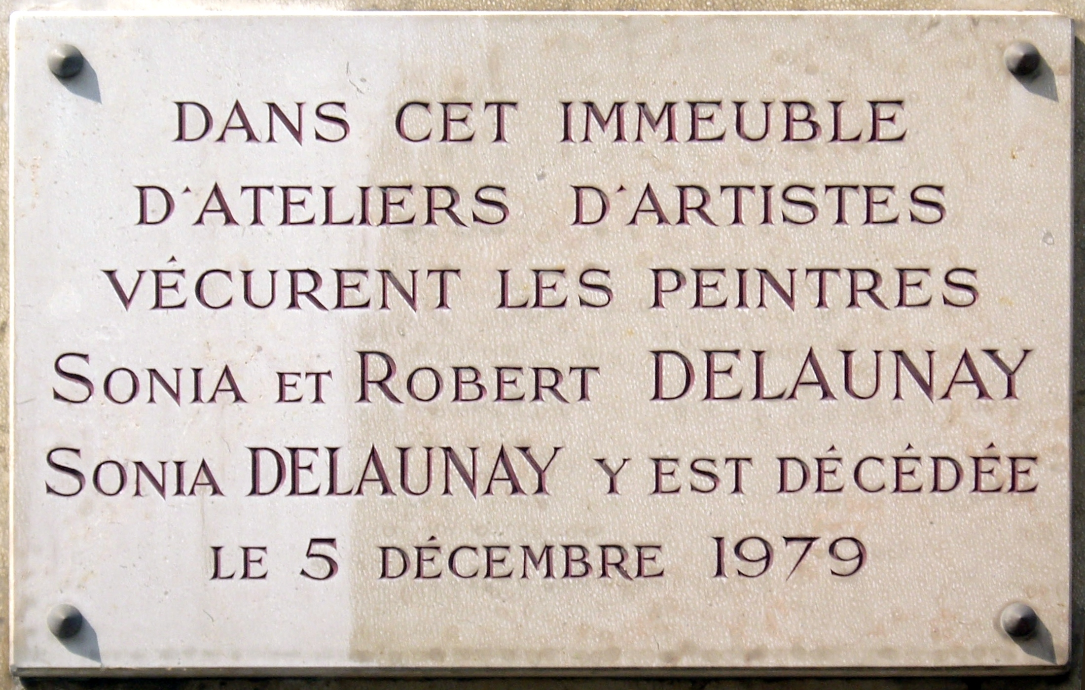 Plaque apposée au n° 16 de la rue de Saint-Simon, Paris 7e, où vécurent les peintres Sonia et Robert Delaunay (1885-1979 et 1885-1941) et où Sonia Delaunay mourut le 5 décembre 1979.